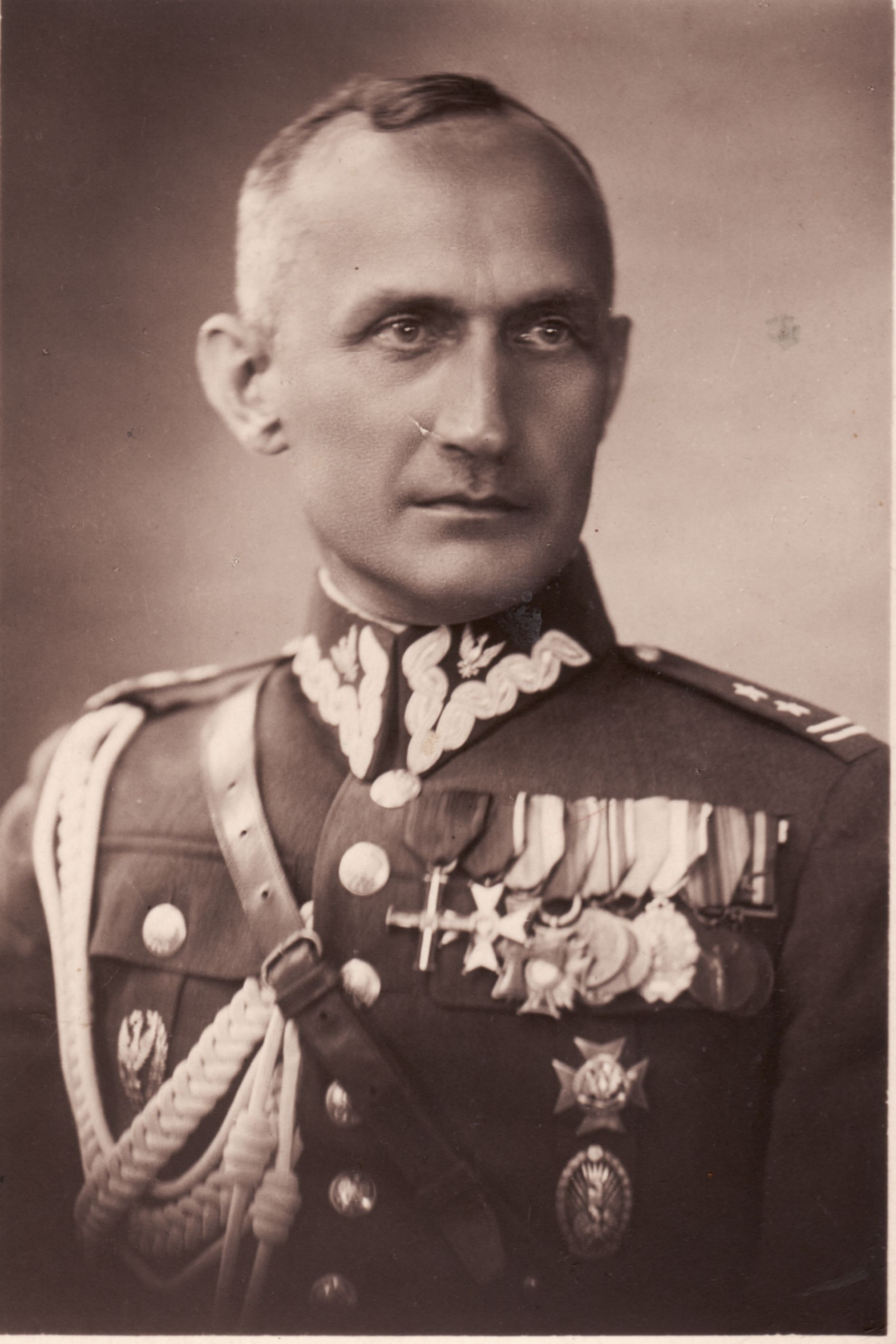 Podpułkownik Leon "Lel" Bączkiewicz. W stopniu majora służył w 14 pp